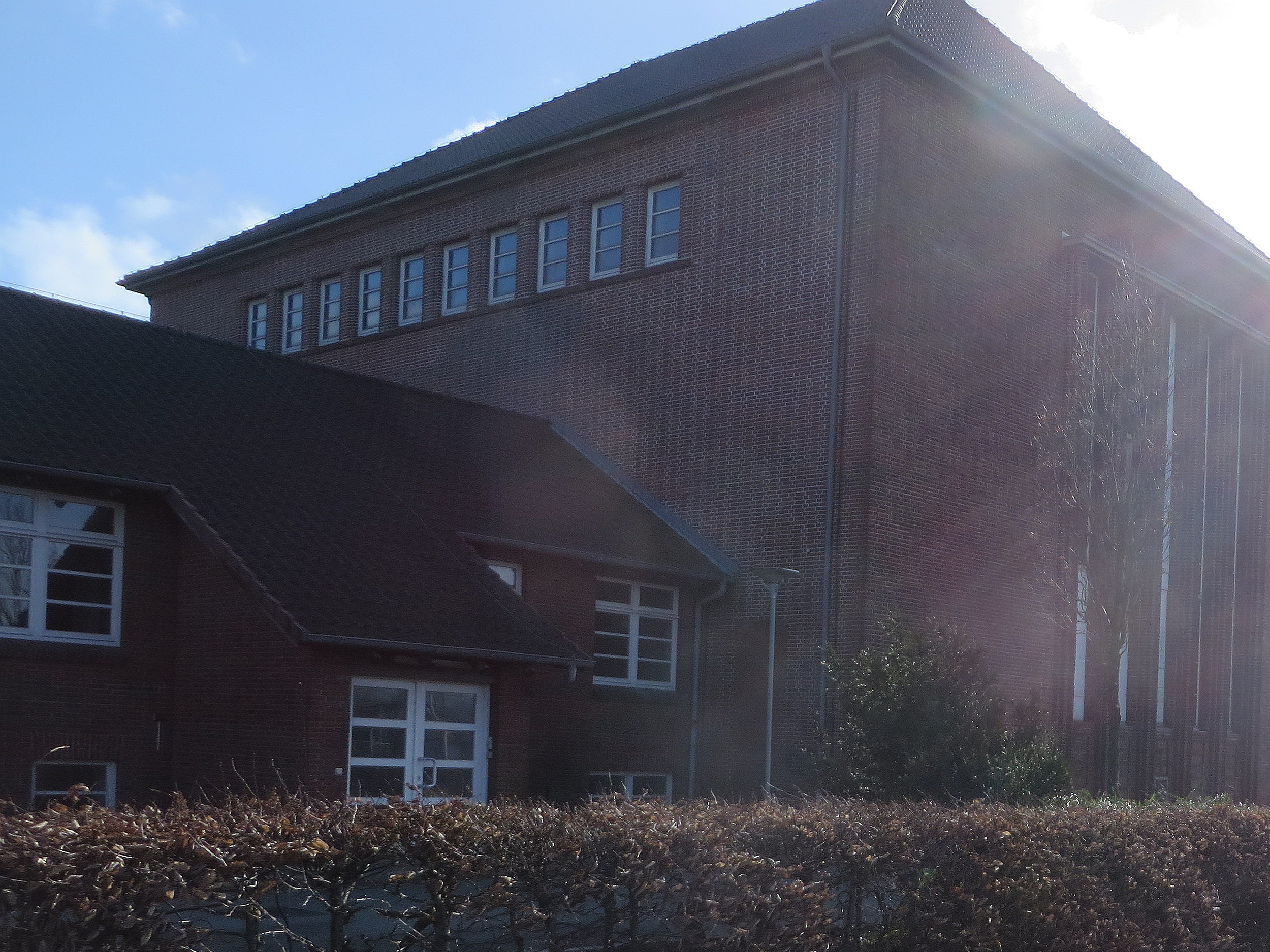 Backsteinerne Gebäude aus den 70'er Jahren vor dem Abriß (Flensburg-Mürwik Februar 2017), Bild 12; Bei dem dreiteiligen, backsteinernen Anbau soll es sich um das Technikgebäude des BWDLZ gehandelt haben.